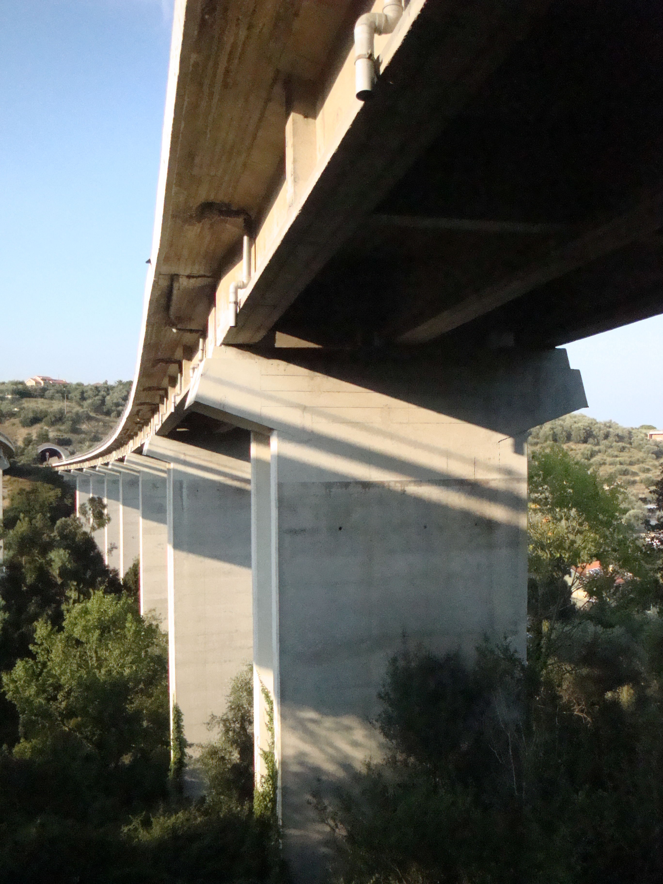 L'Autostrada A10 nei pressi di Diano Marina.